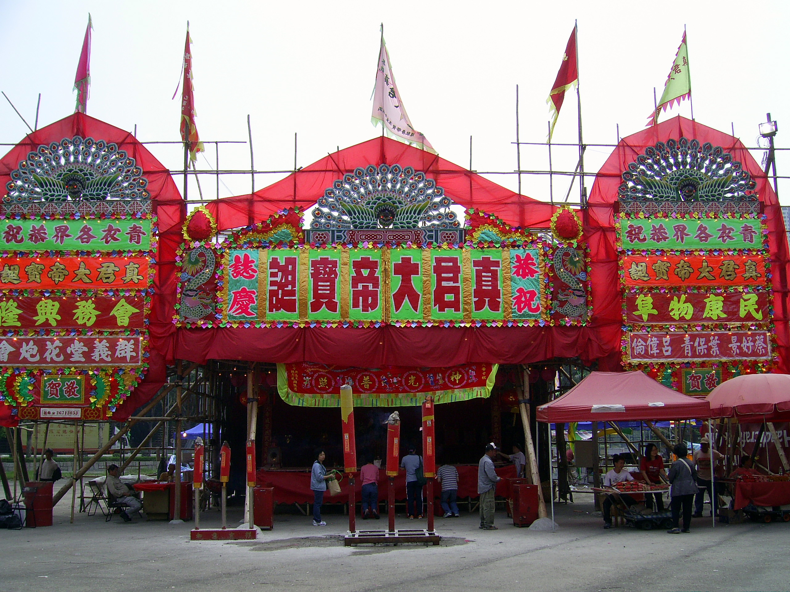 中文（香港）: 真君誕神棚